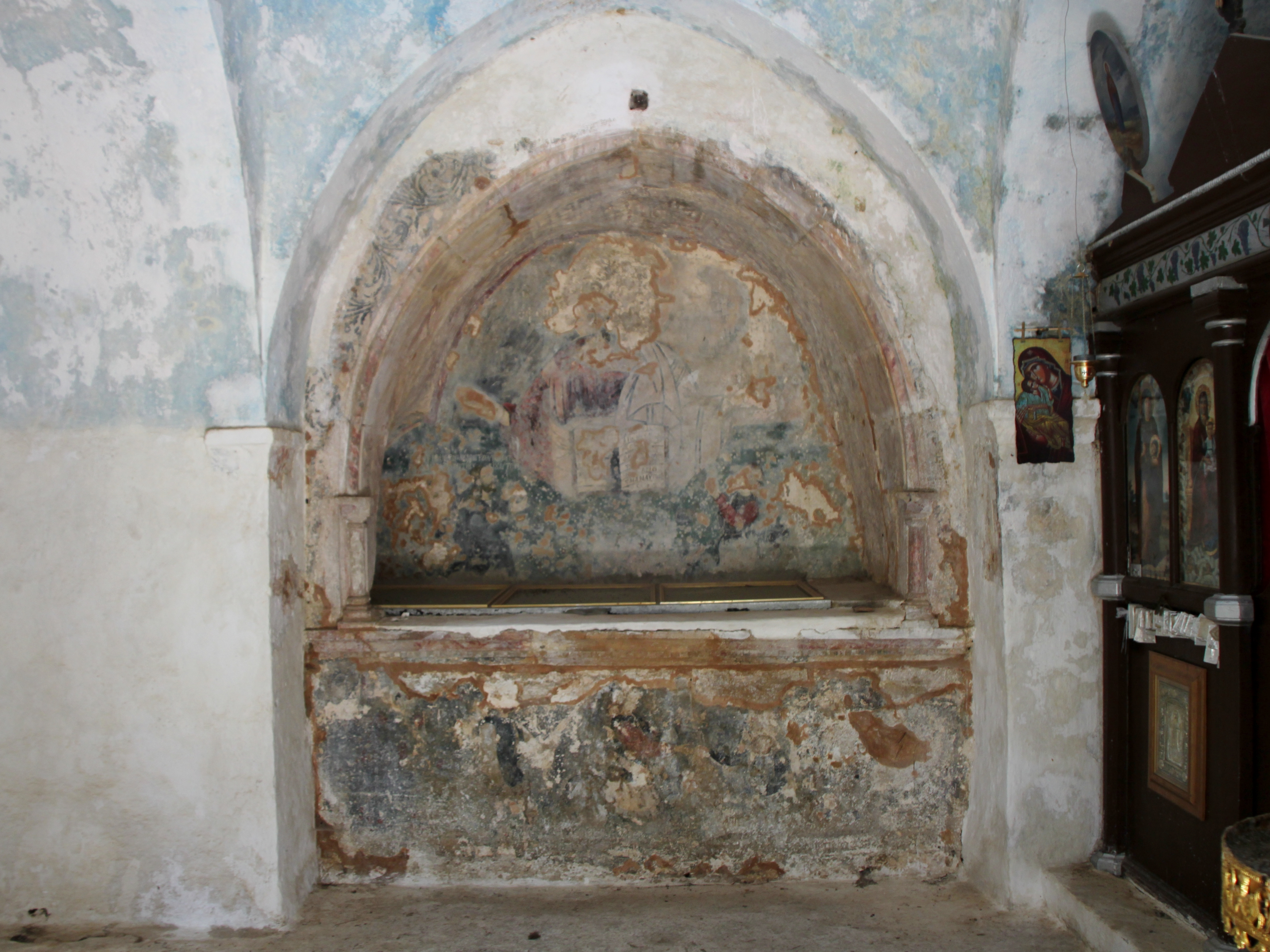 Gruft in der Kapelle Agia Paraskevi (Αγία Παρασκευή) im Amari-Becken, Gemeinde Syvritos, Präfektur Rethymno, Kreta, Griechenland